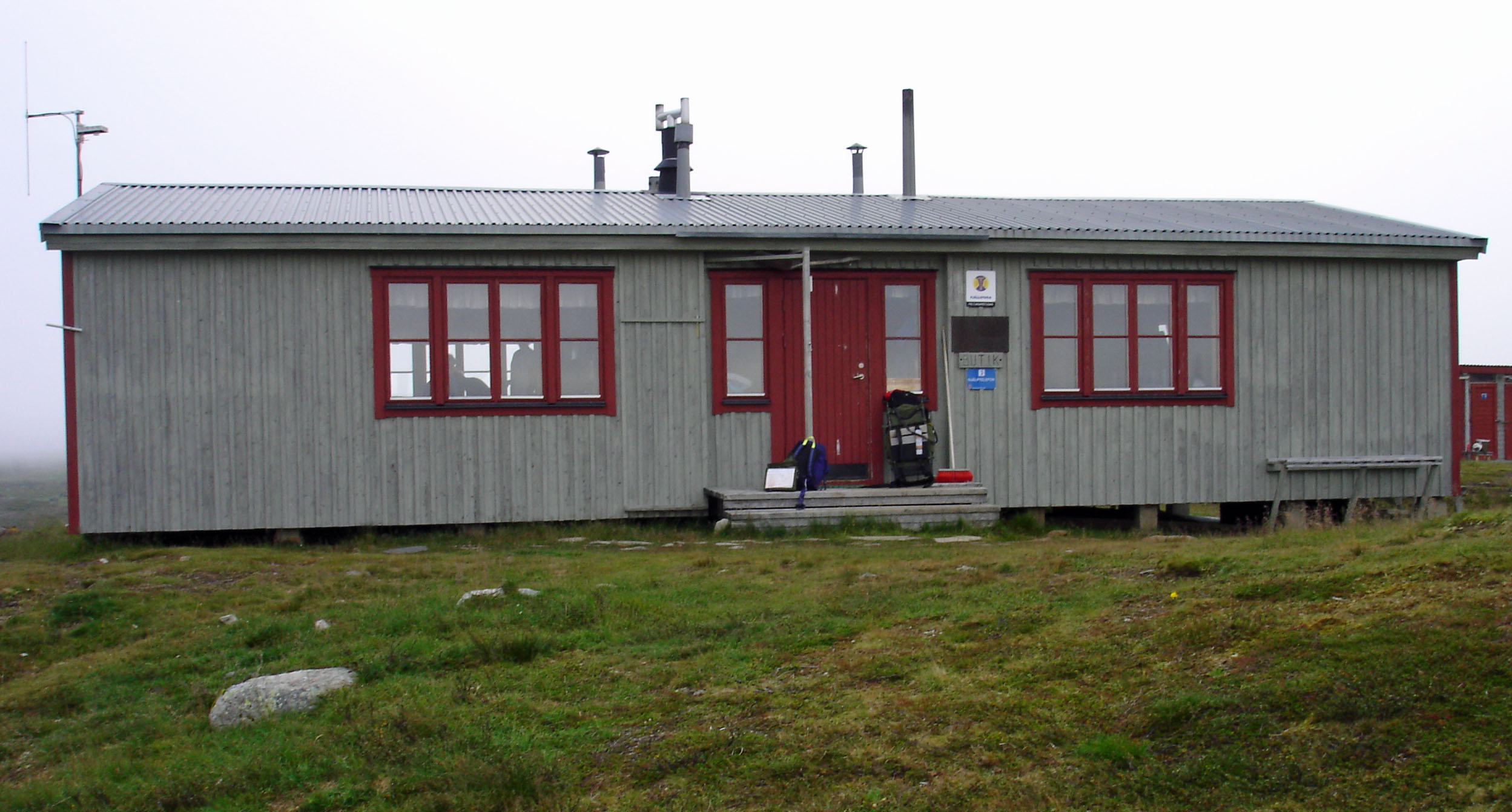 Fjällstuga vid vandringsled mellan Ramundberget och Helags i Jämtland. På fasaden finns en kopia av en minnestavla som numera sitter i förstugan.